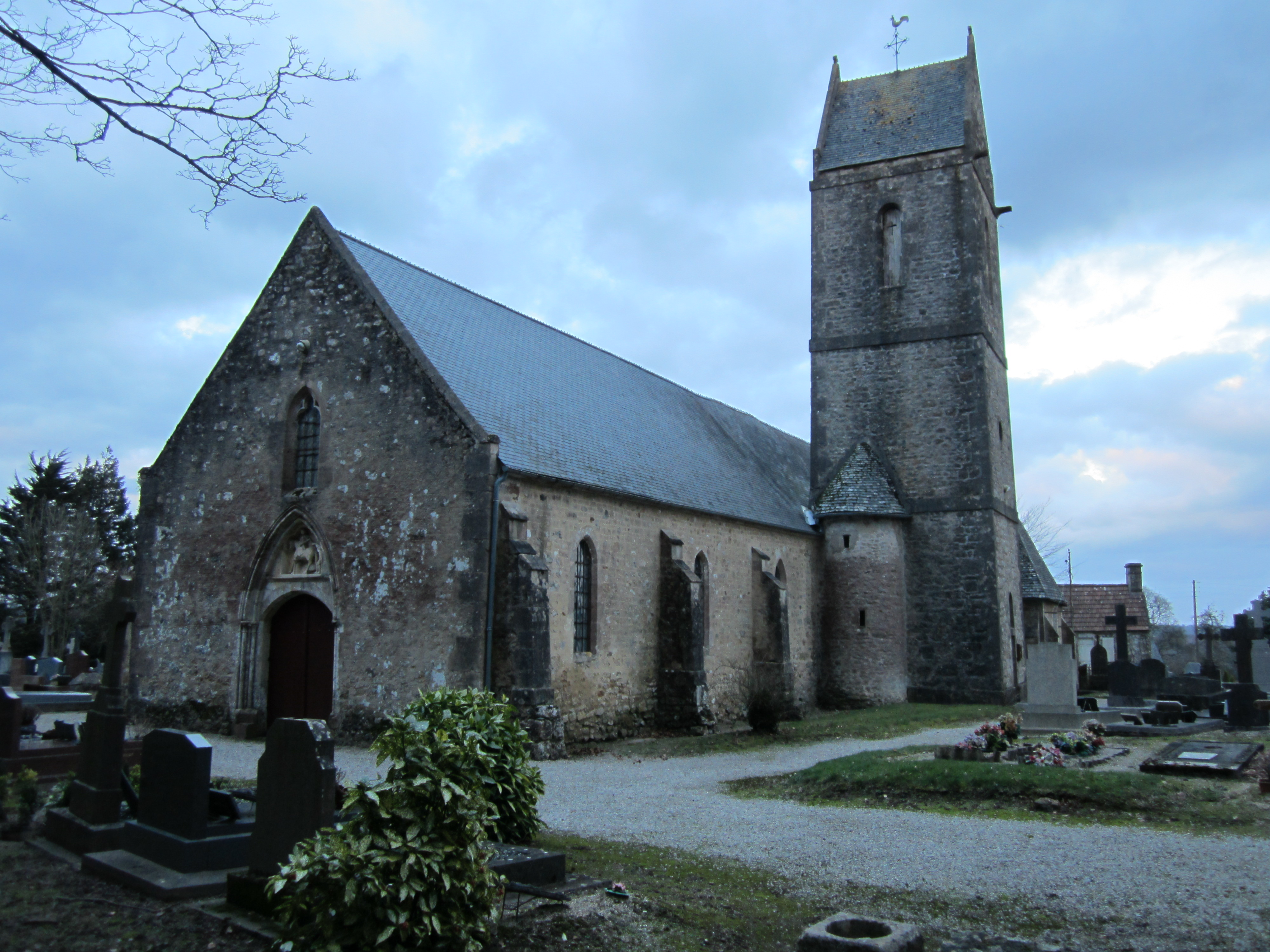 Église Saint-Martin de Montaigu-la-Brisette, XIIIe .